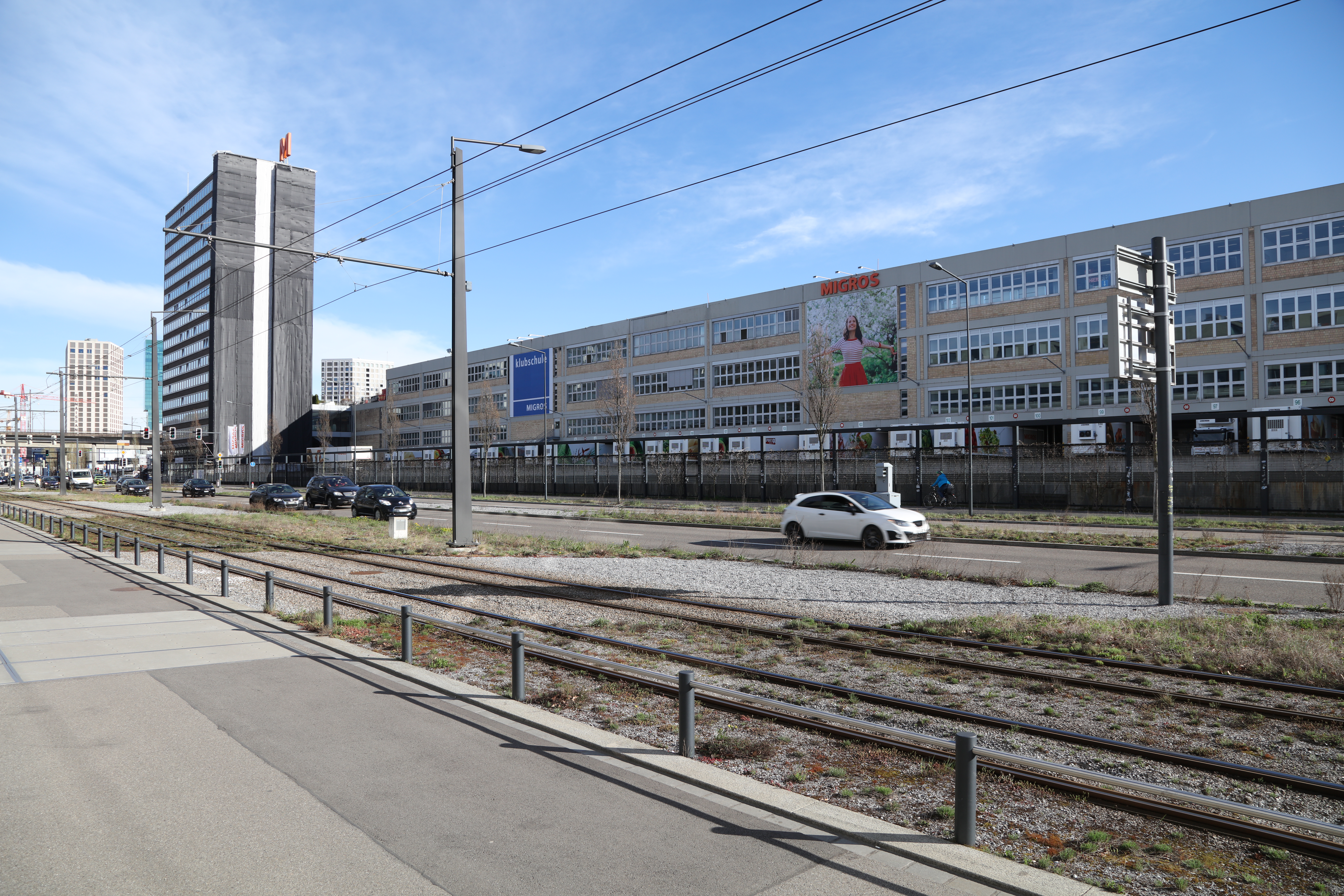 Das Migros Verteilzentrum Herden in Zürich